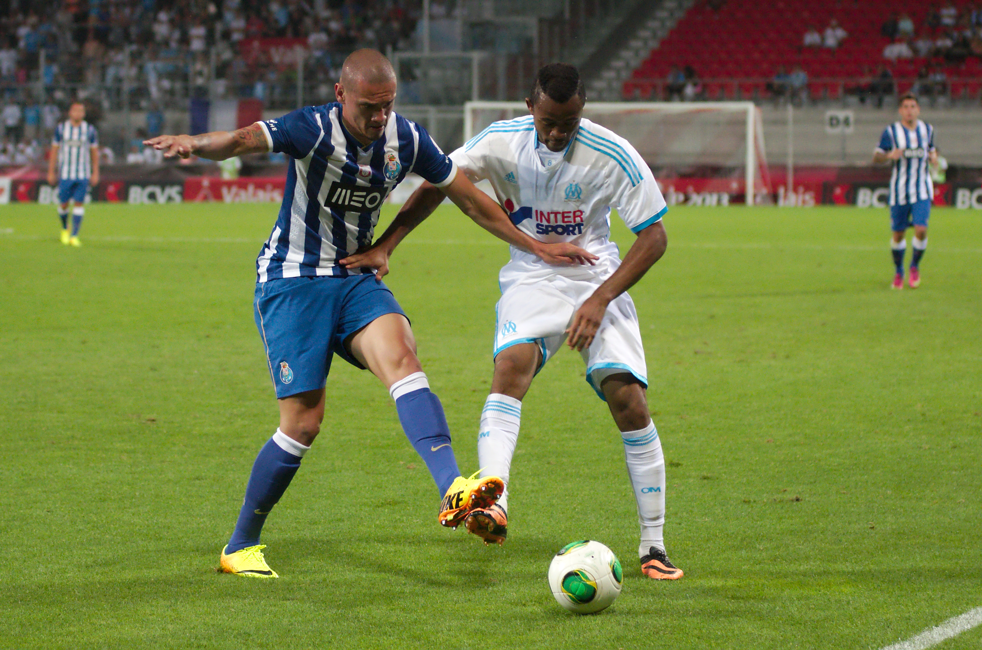 Valais Cup 2013 - OM-FC Porto - 20130713 - Maicon et Jordan Ayew